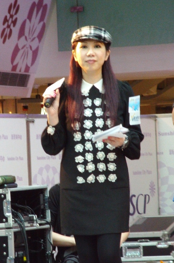 中文（香港）: 李紫昕的樣子